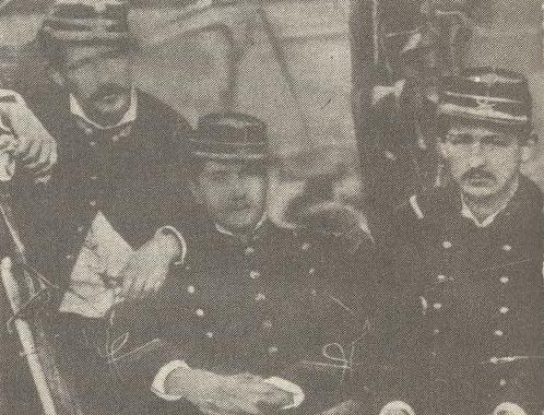 Soldados chilenos. Miembros de la 4a Compañía, Batallón Chacabuco, 6o de Línea en la Guerra del Pacifico.